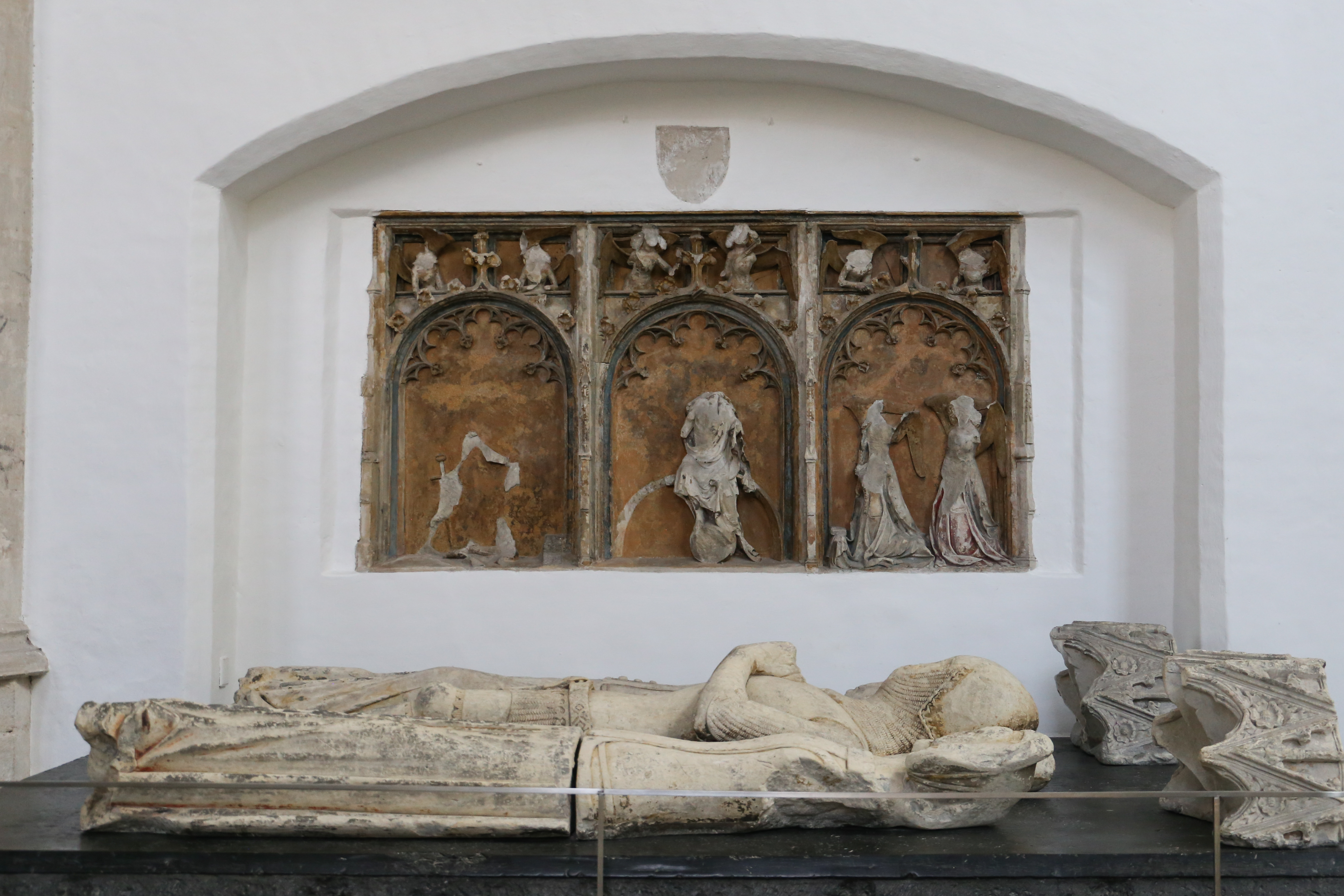 Interieur Grote of Onze-Lieve-Vrouwekerk in Breda